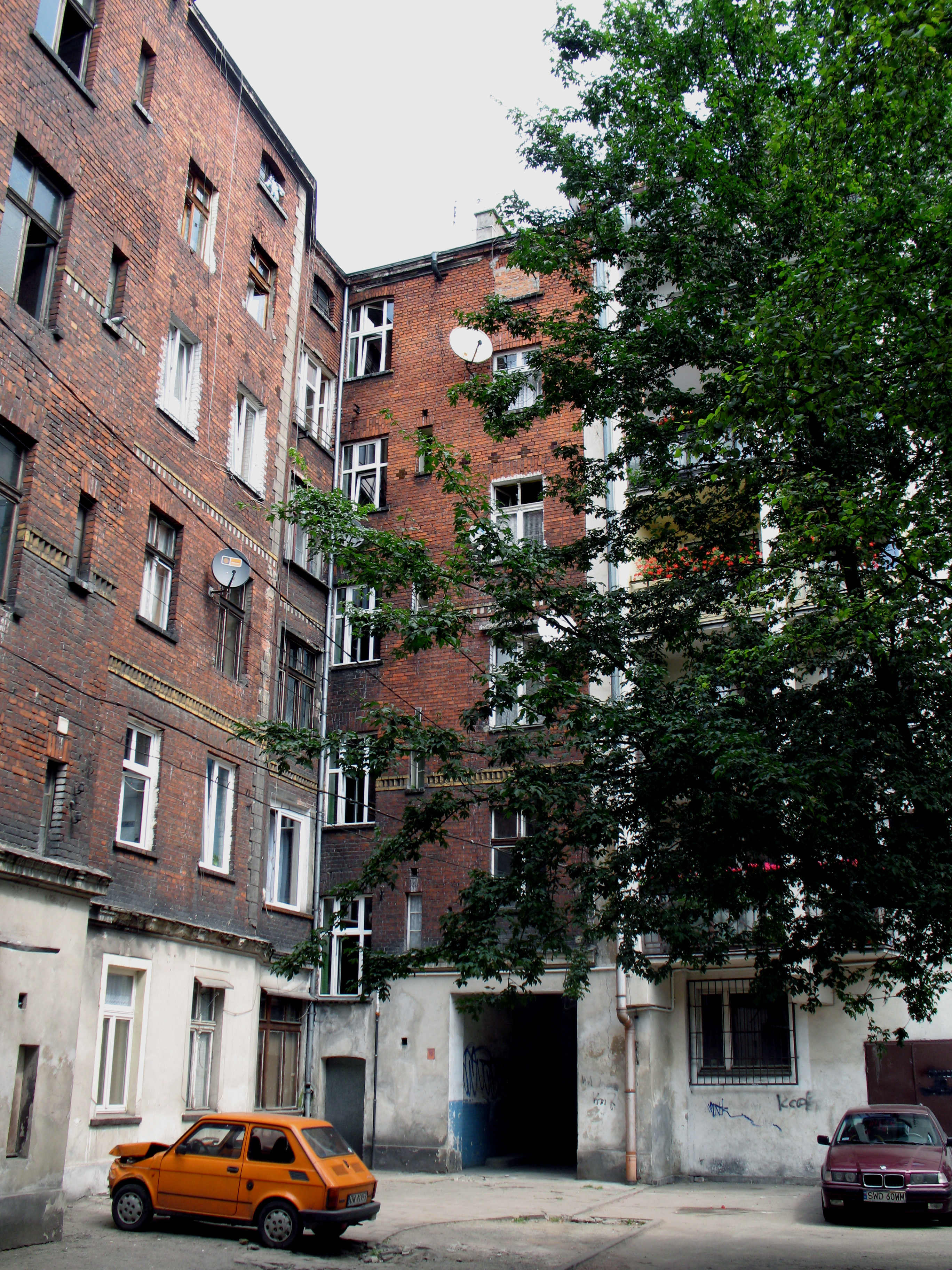 Typowe podwórko na ul. Traugutta we Wrocławiu. Rejon tzw. "trójkąta" (Przedmieście Oławskie)